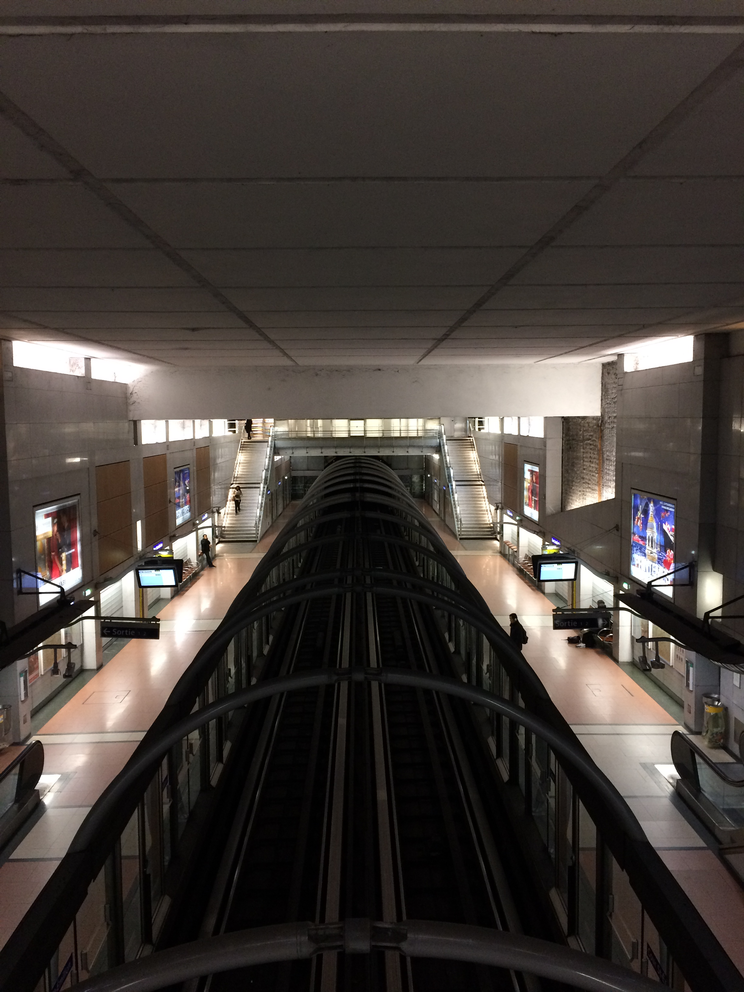 Mezzanine de la station Cour Saint-Emilion de la ligne 14 du métro de Paris